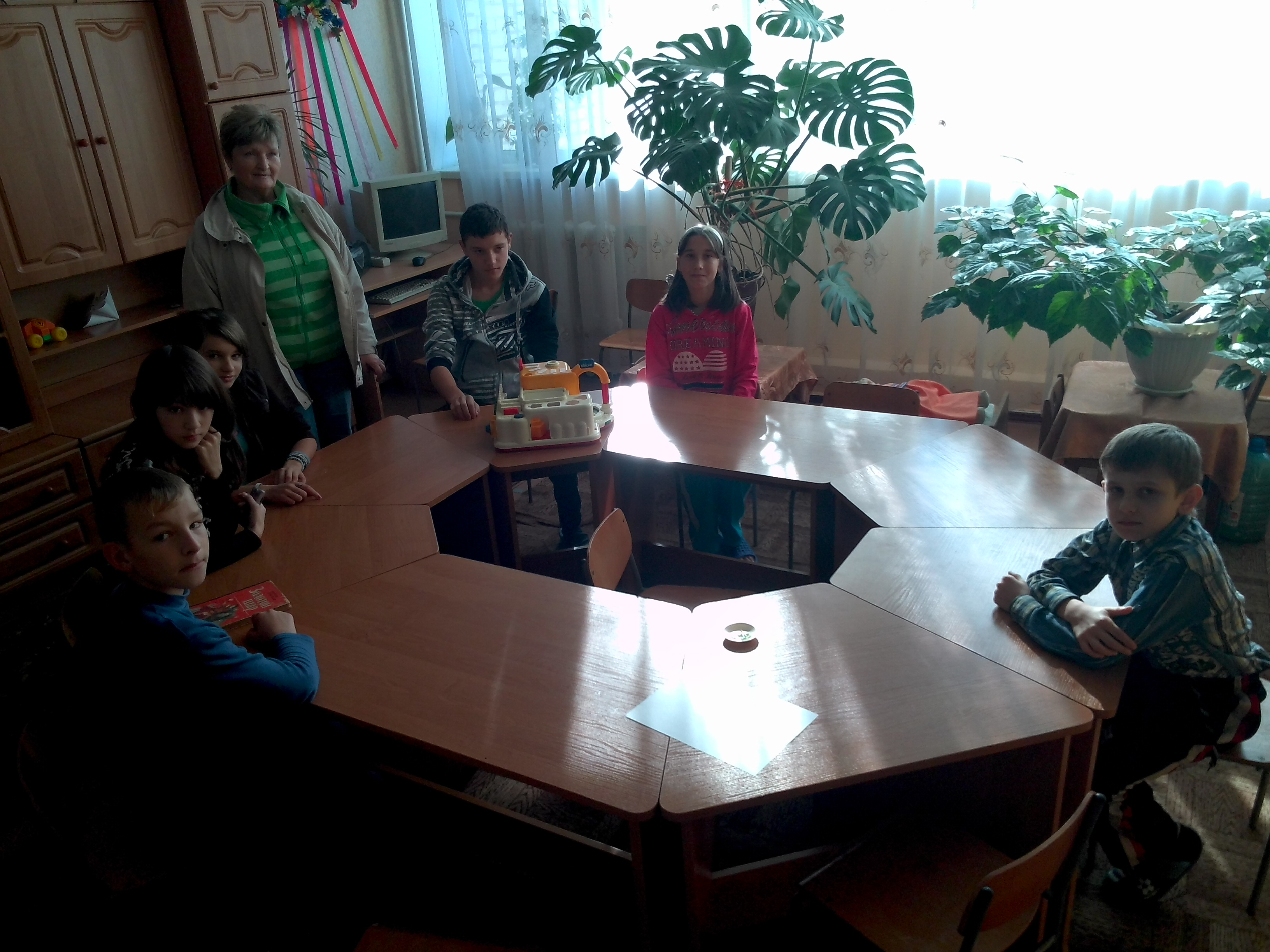 Липовецька обласна лікарня відновного лікування дітей. Тут проходять курс оздоровлення діти з усієї Вінниччини